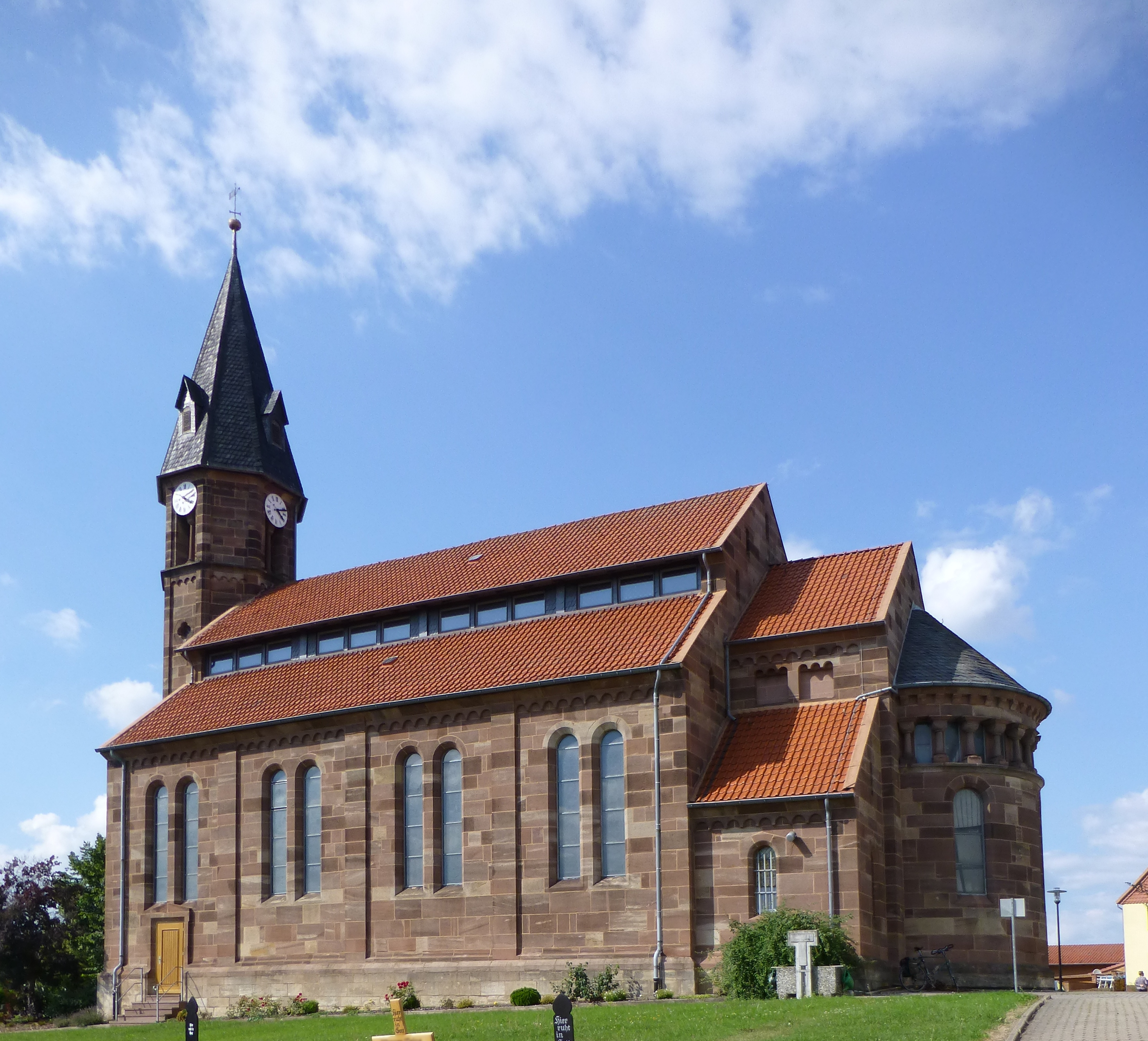 Katholische Pfarrkirche St. Andreas in Mingerode, Duderstadt, Untereichsfeld. Erbaut 1872/73 durch Wilhelm Tochtermann (Hildesheim).